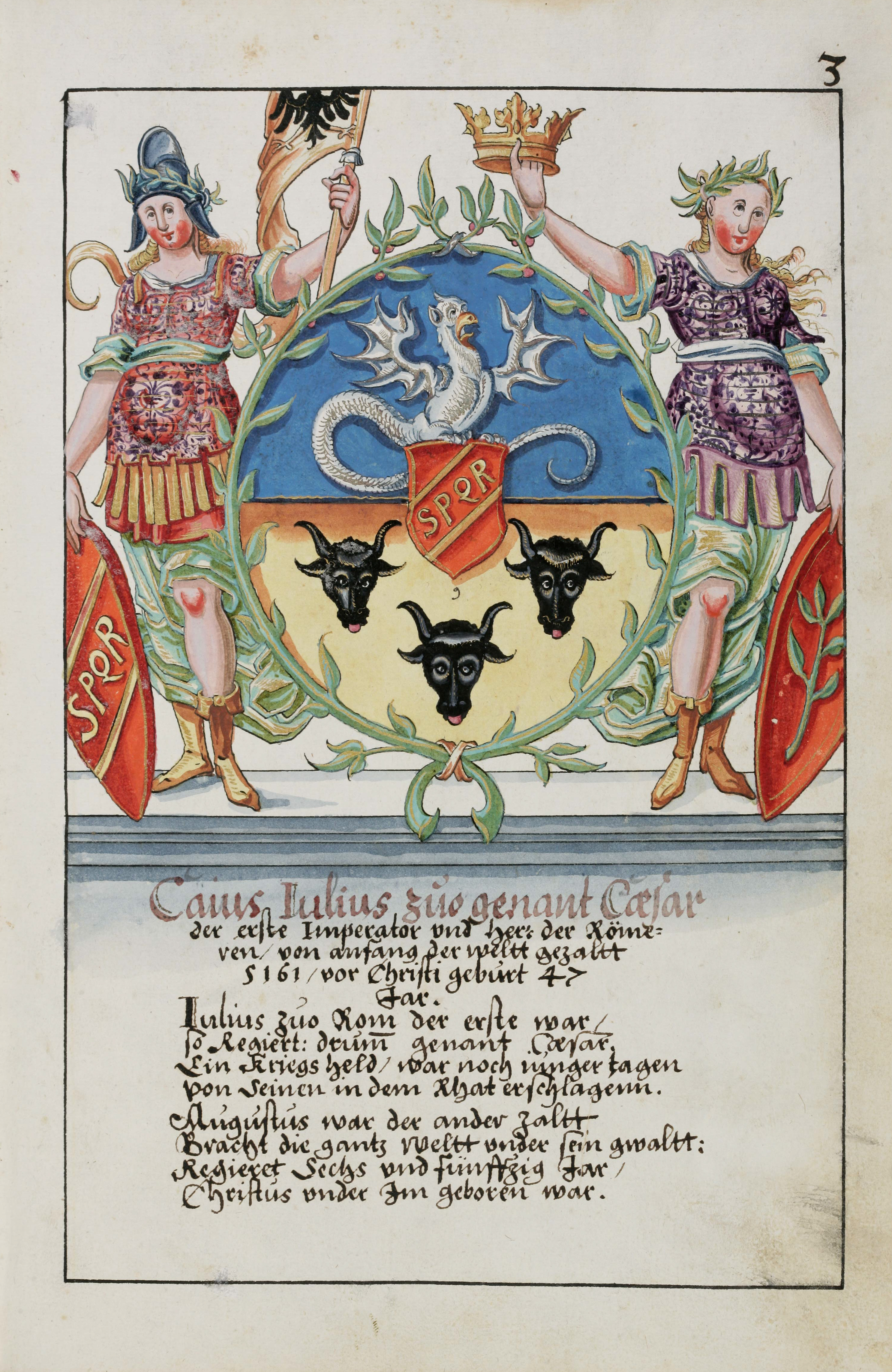 Wappenbuch des Hans Ulrich Fisch. Papier, 31.5 x 19.5 cm, Aarau 1627. Aarau, Staatsarchiv Aargau, V/4-1985/0001, fol. 3r, (apokryphes) Wappen des Gaius Julius Ceasar